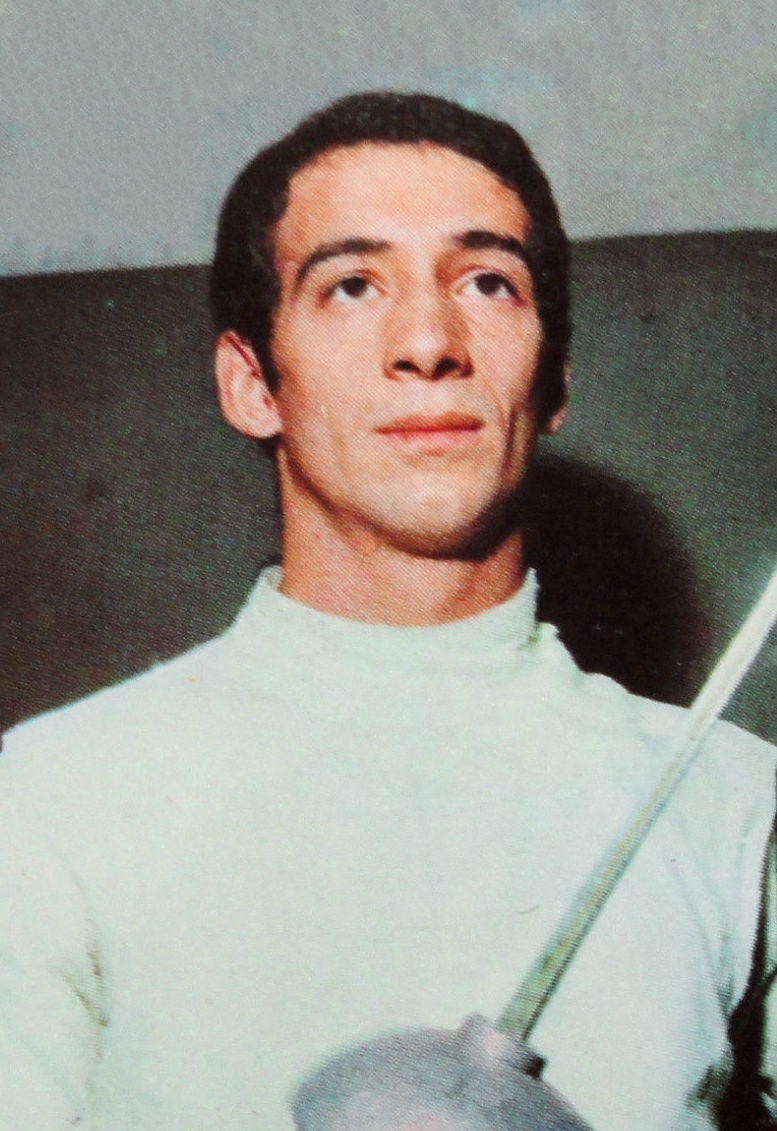 CAMPIONI DELLO SPORT 1969/70-n.379-FRANCESCONI (ITA)-SCHERMA